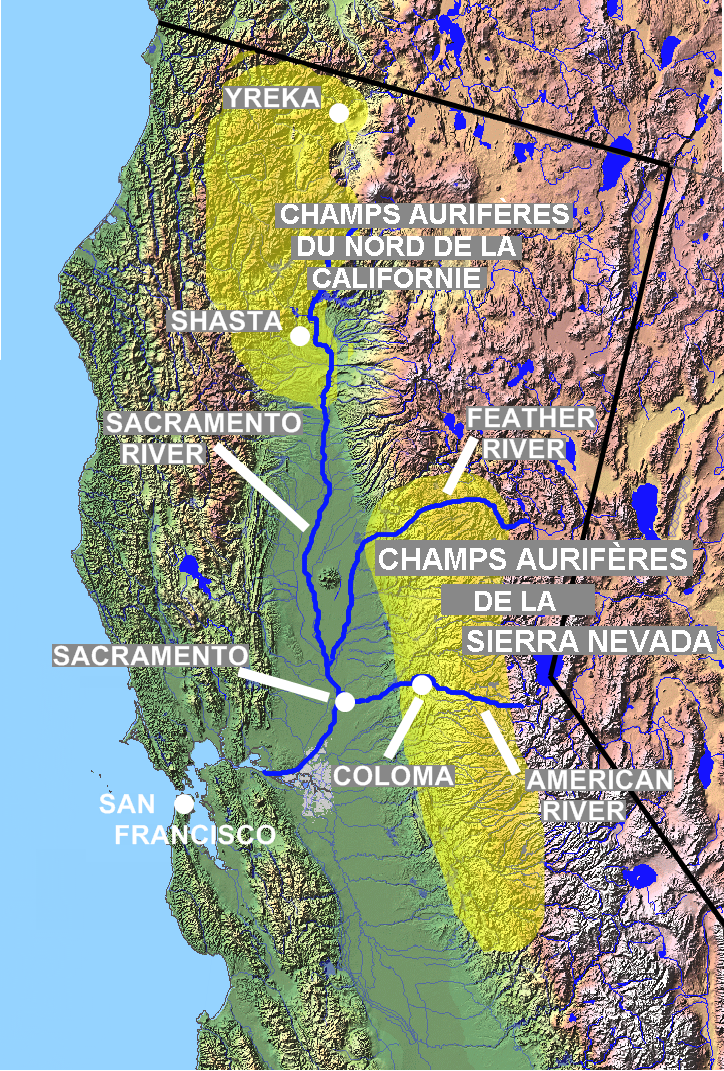 Champs aurifères de la Sierra Nevada et du nord de la Californie. Carte traduite.